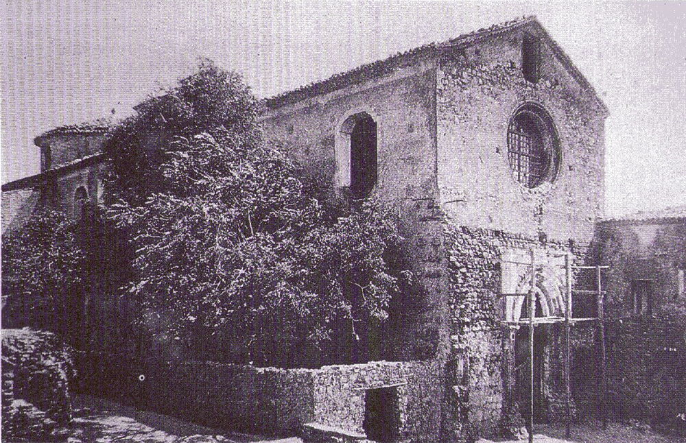 L'Abbazia Florense negli anni '20